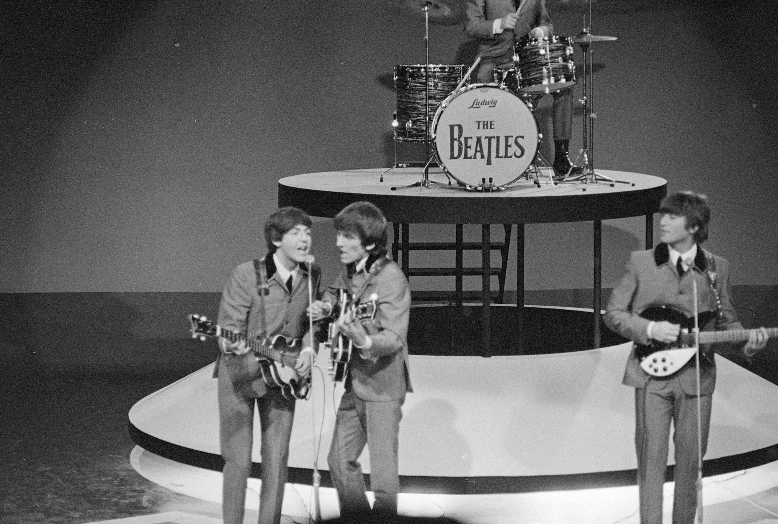 CollectieCollectie Fotoburo de BoerBeschrijvingThe Beatles in Treslong.FotonummerNL-HlmNHA_1478_2588K_30_2DocumenttypeHistorieprenten, tekeningen en foto'sVervaardigerBoer, Poppe de LandNederland ProvincieZuid-Holland GemeenteHillegom PlaatsHillegom Begindatum05-06-1964Einddatum05-06-1964Datering gebeurtenis05-06-1964TechniekFoto TrefwoordenBeatles